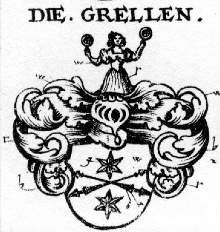 Wappen derer Grellen, einem pommerischen Adelsgeschlecht